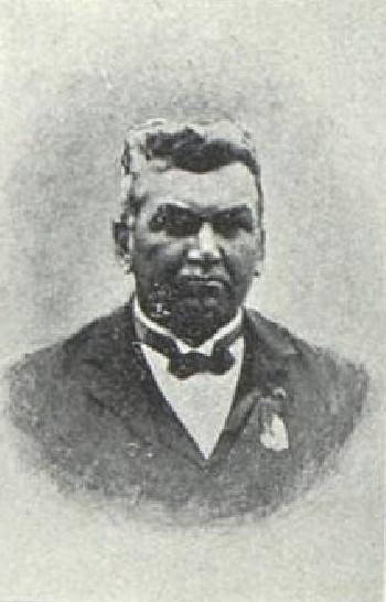 Vojtěch Krž (1861-1924), rakouský a český rolník a politik